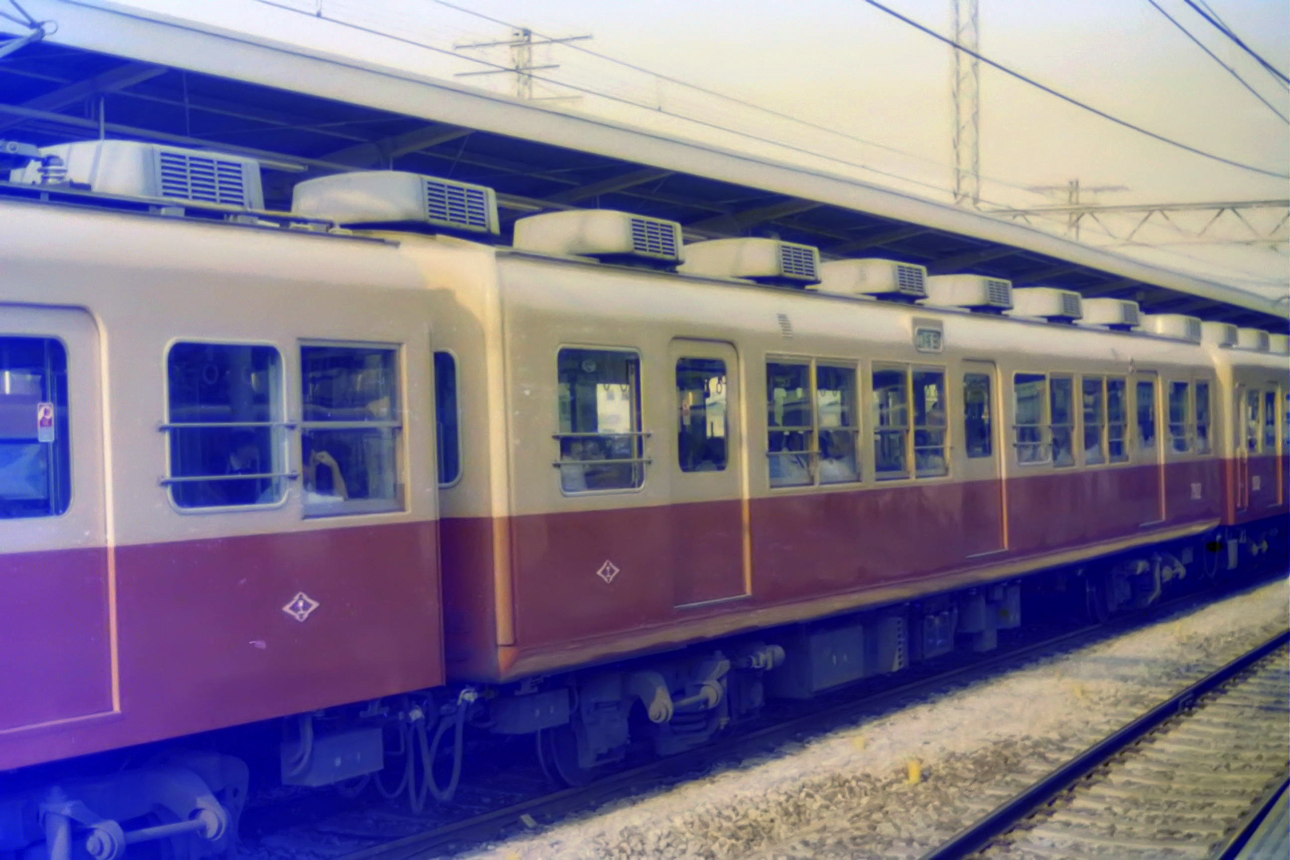 阪神電気鉄道 7922